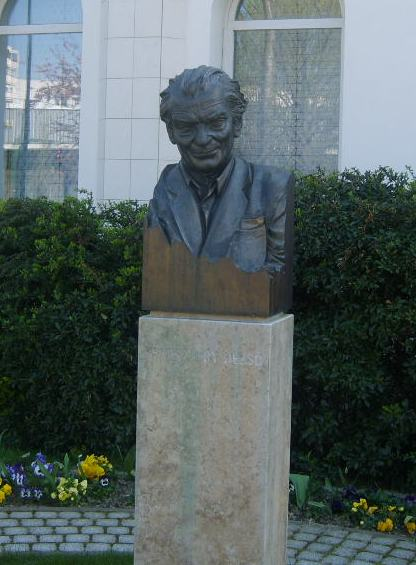 Keresztury Dezso, Zalaegerszeg, Hungary